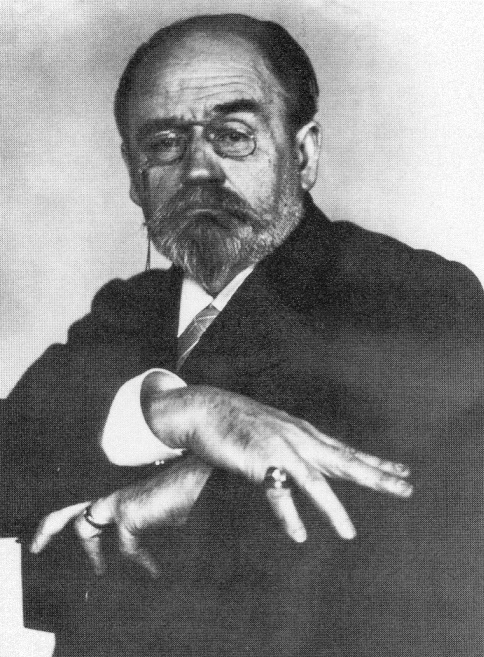 Emile Zola photographié par Nadar en 1898. Emile Zola photographed by Nadar in 1898